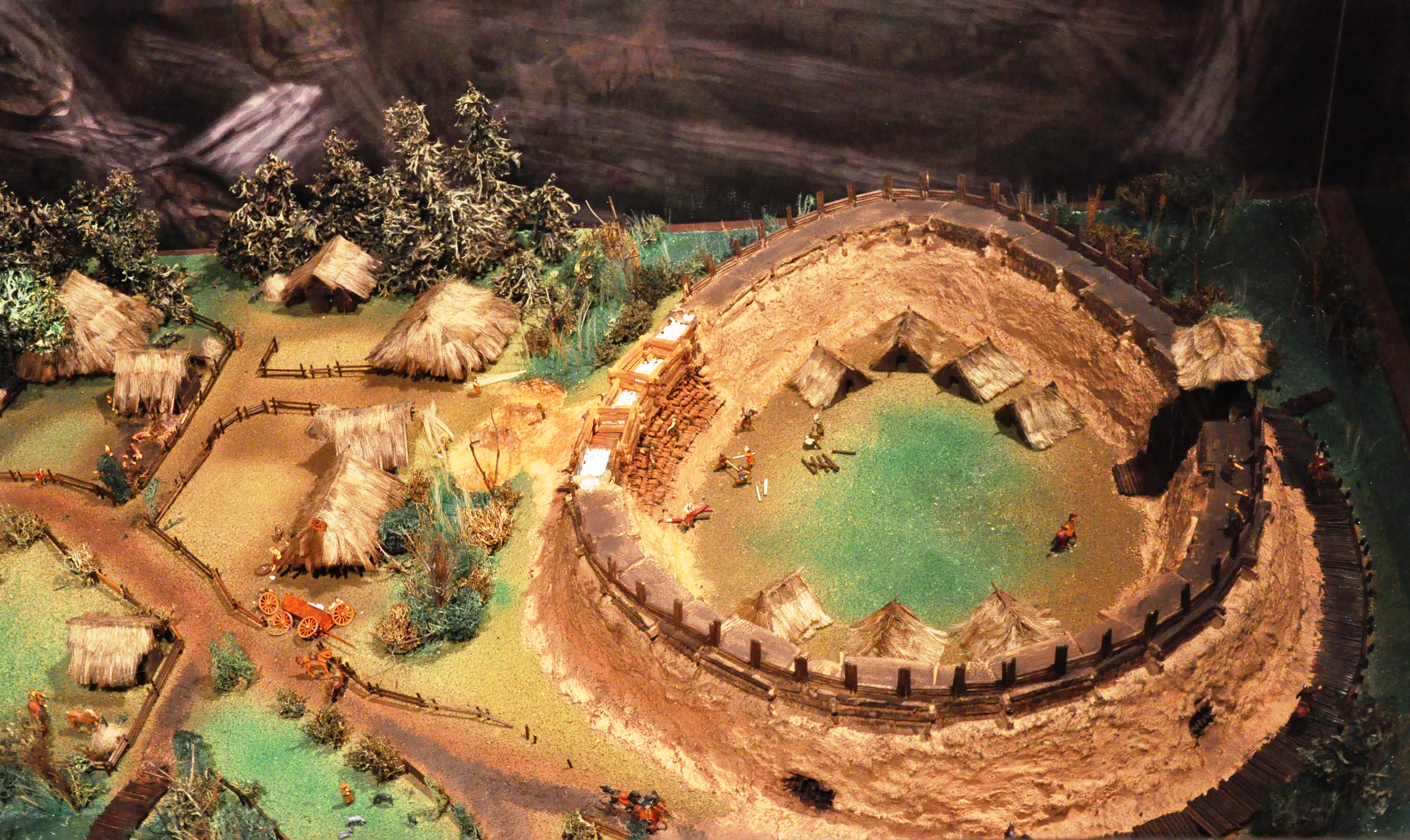 Archäologisches Museum in Warschau, Ausstellung, Modell einer Siedlung in Bródno Stare (heutiges Warschau-Targowek), ca 10.-12. Jahrhundert n. Chr